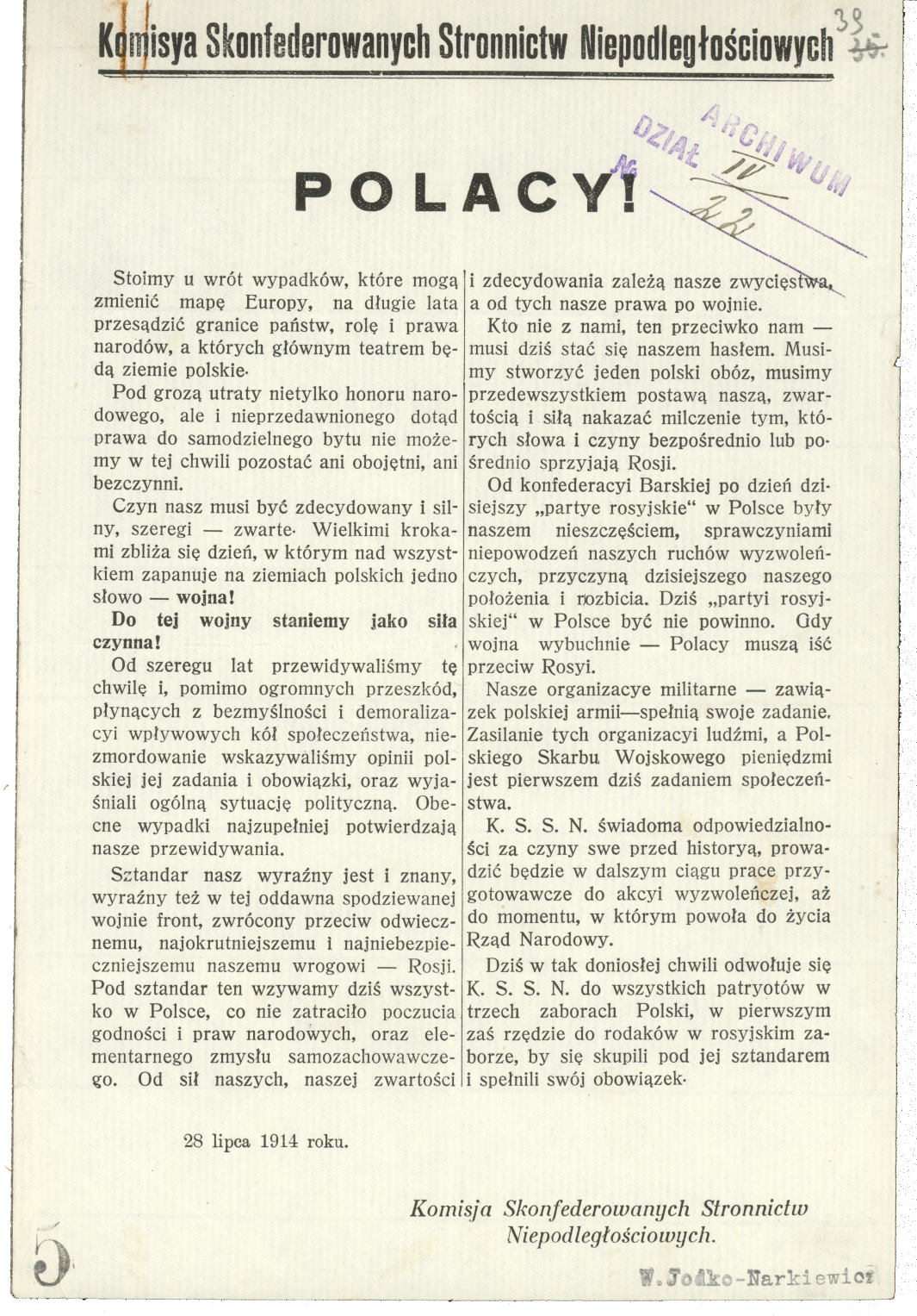 Ulotka komisji Skonfederowanych Stronnictw Niepodległościowych